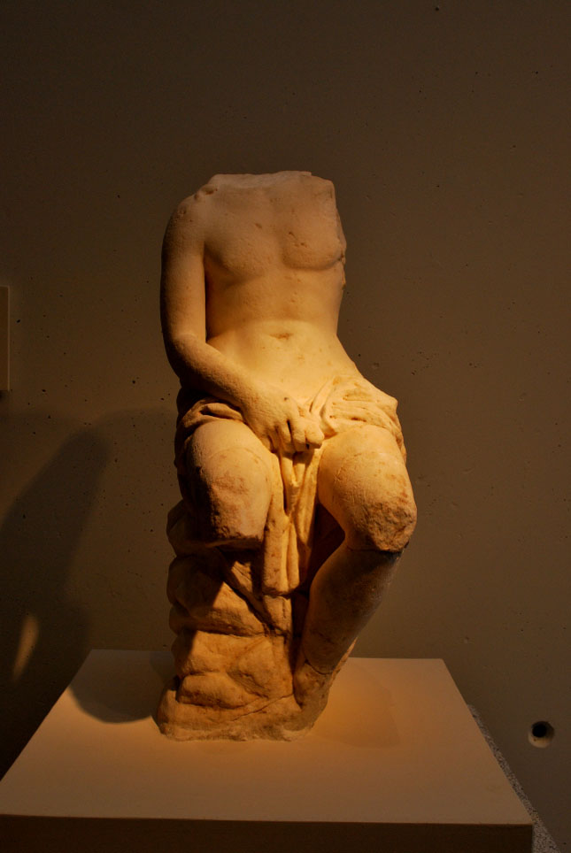 Escultura de Apolo procedente del teatro romano de Cartagena. Museo Arqueológico de Cartagena